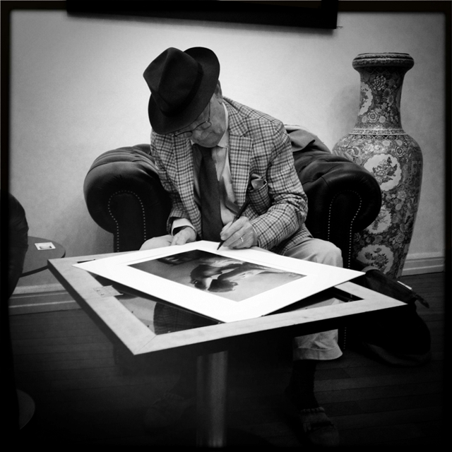 Le photographe David Hamilton, signant une de ses oeuvres, en décembre 2012 (Photo: François Besch)